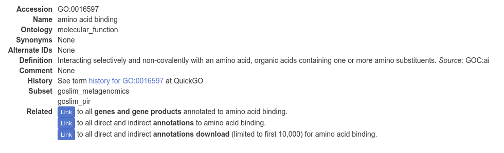 مثالی از یک اصطلاح GO